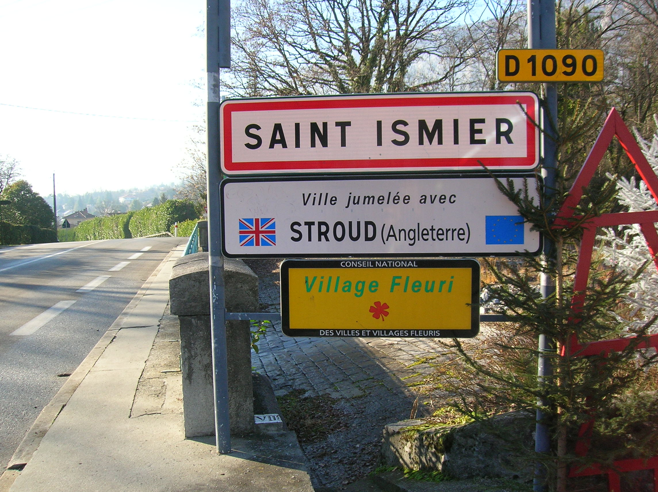 Panneaux à l'entrée de Saint-Ismier, Isère, Rhone-Alpes, France.